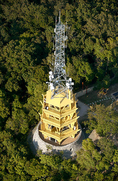 Sipos-hegyi kilátó, Fonyód